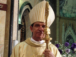 Bispo diocesano de São Carlos